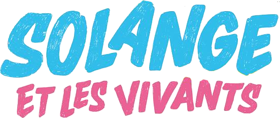 Logo de Solange et les vivants.